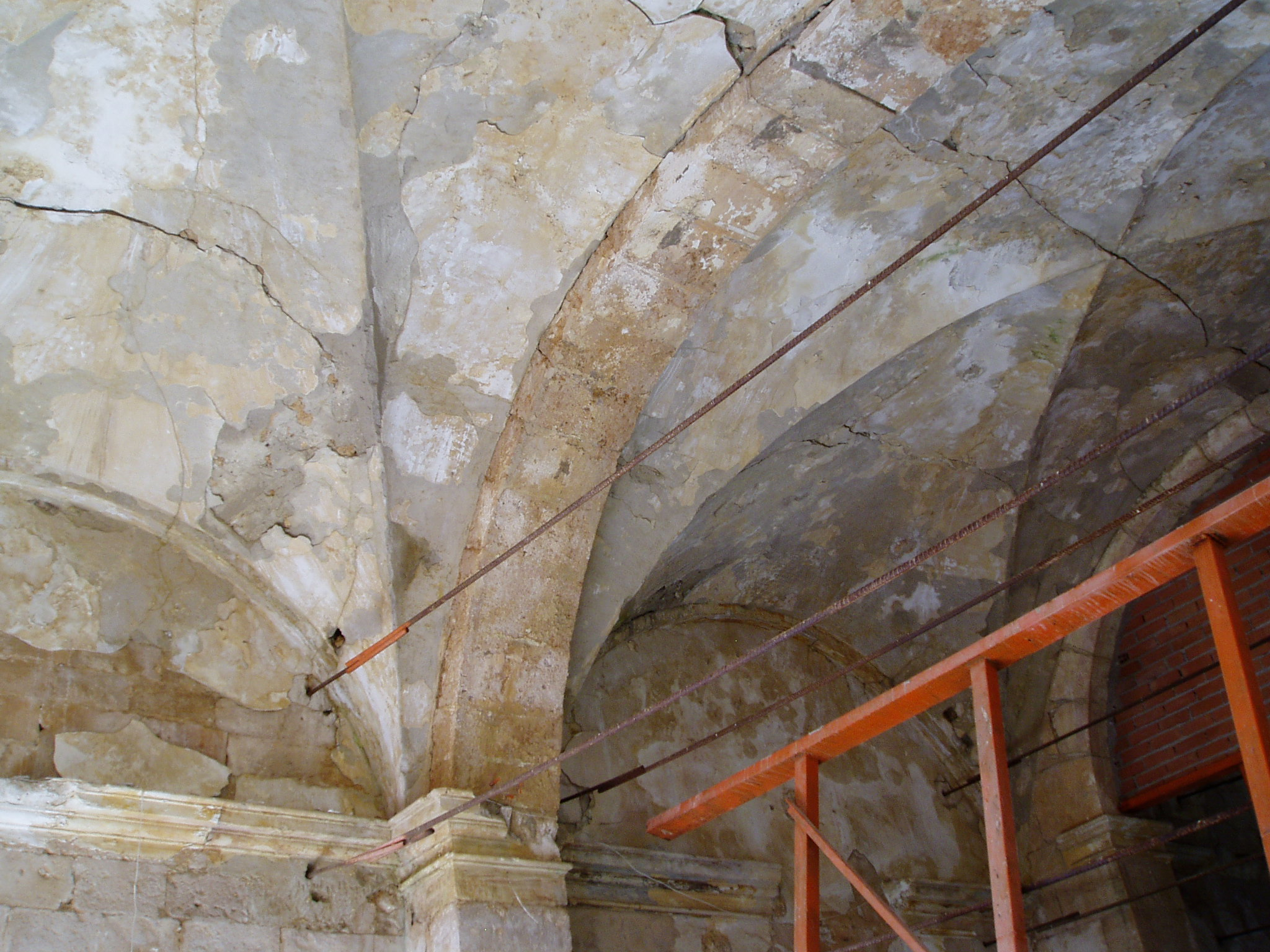 Iglesia románica de Villaescusa de Palositos (Guadalajara-España). Declarada Bien de Interés Cultural en junio de 2012 por la Junta de Castilla-La Mancha, con la categoría de Monumento. Su estado de deterioro y abandono hace presagiar que no tardará en desplomarse. En un sillar está grabado el nombre de su autor “Gilem”. El resto de sillares está destinado a grabar el nombre de los que, con su falta de apoyo real al Patrimonio Histórico, están provocando su desaparición para generaciones futuras.